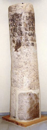 Columna Miliaria en el Museo Arqueológico de Lorca (Murcia). Corresponde con la inscripción CIL II 4937, y su texto dice: IMP(erator) CAESAR DIV[I F(ilius)]/ AVGVSTVS CO(n)[S(ul) XI]/ TRIBVNIC[IA] POTES[T(ate) XVI]/ IMP(erator) XIIII PONTIF(ex)/ MAX(imus)/ XXVIII